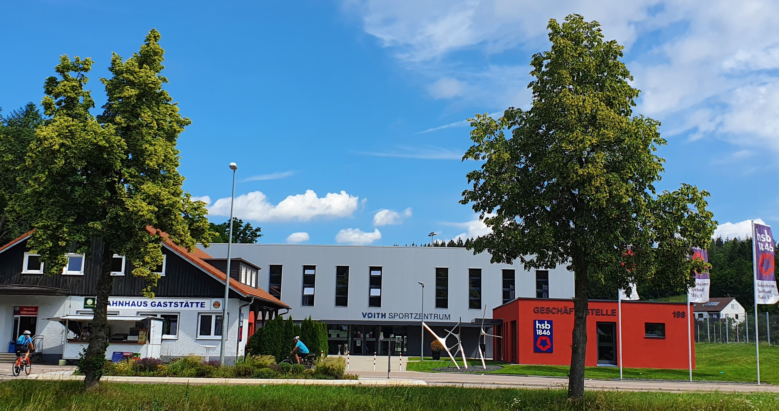 Gaststätte Jahnhaus, Voith-Sportzentrum und HSB-Geschäftsstelle (von links) in Heidenheim an der Brenz